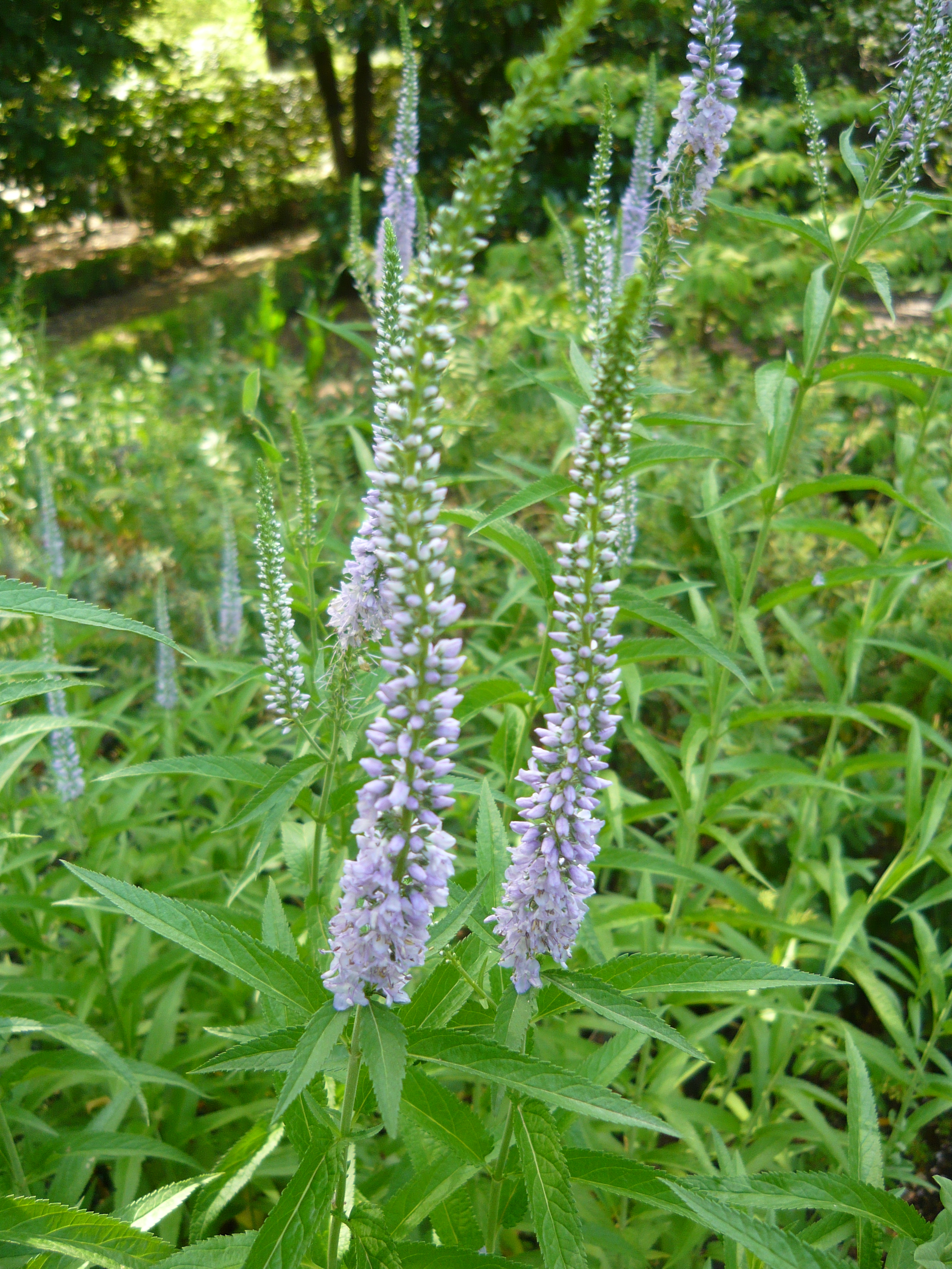 Veronica longifolia. Real Jardín Botánico, Madrid, España.